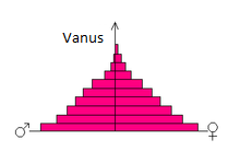 Population Pyramid